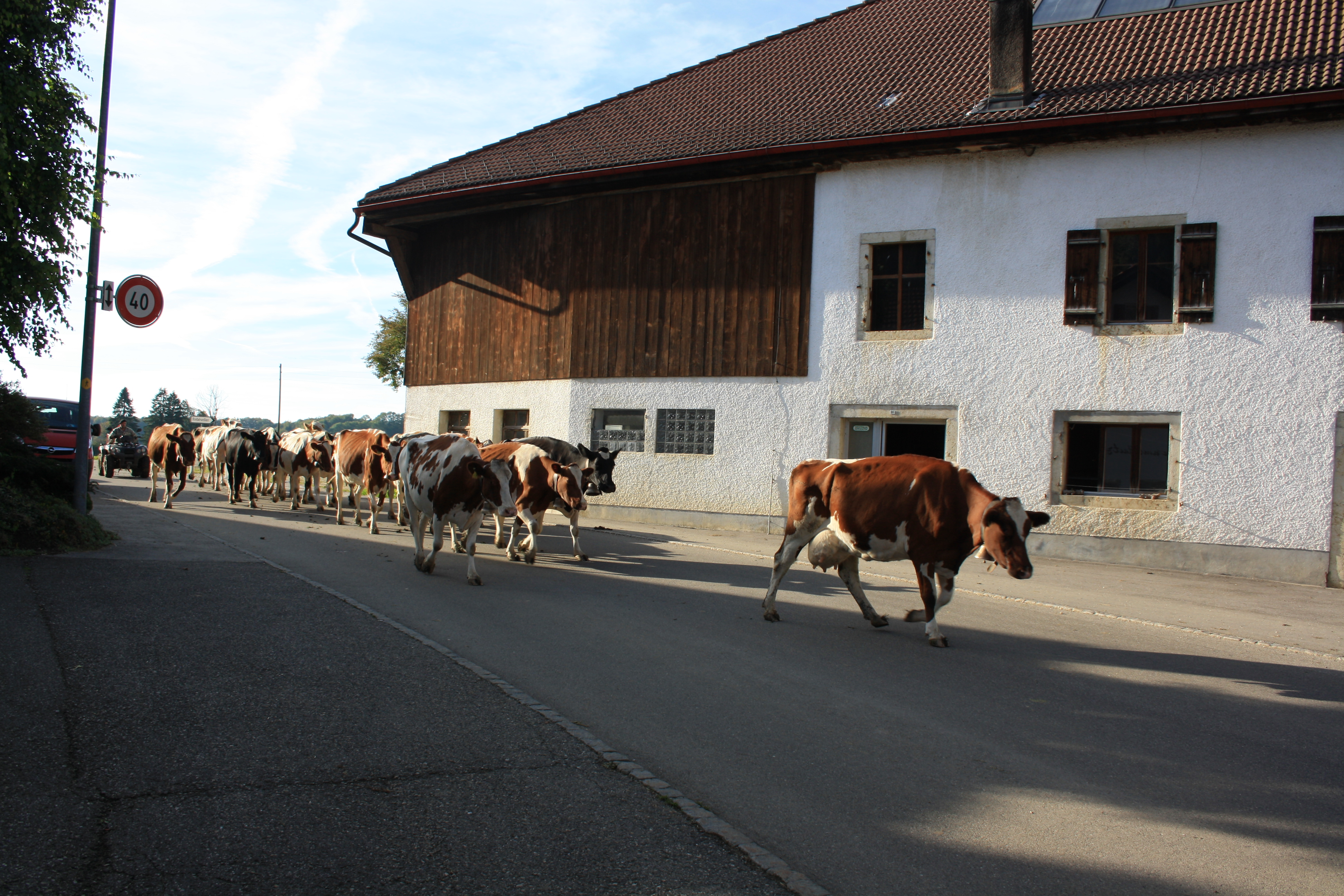 Fornet-Dessous